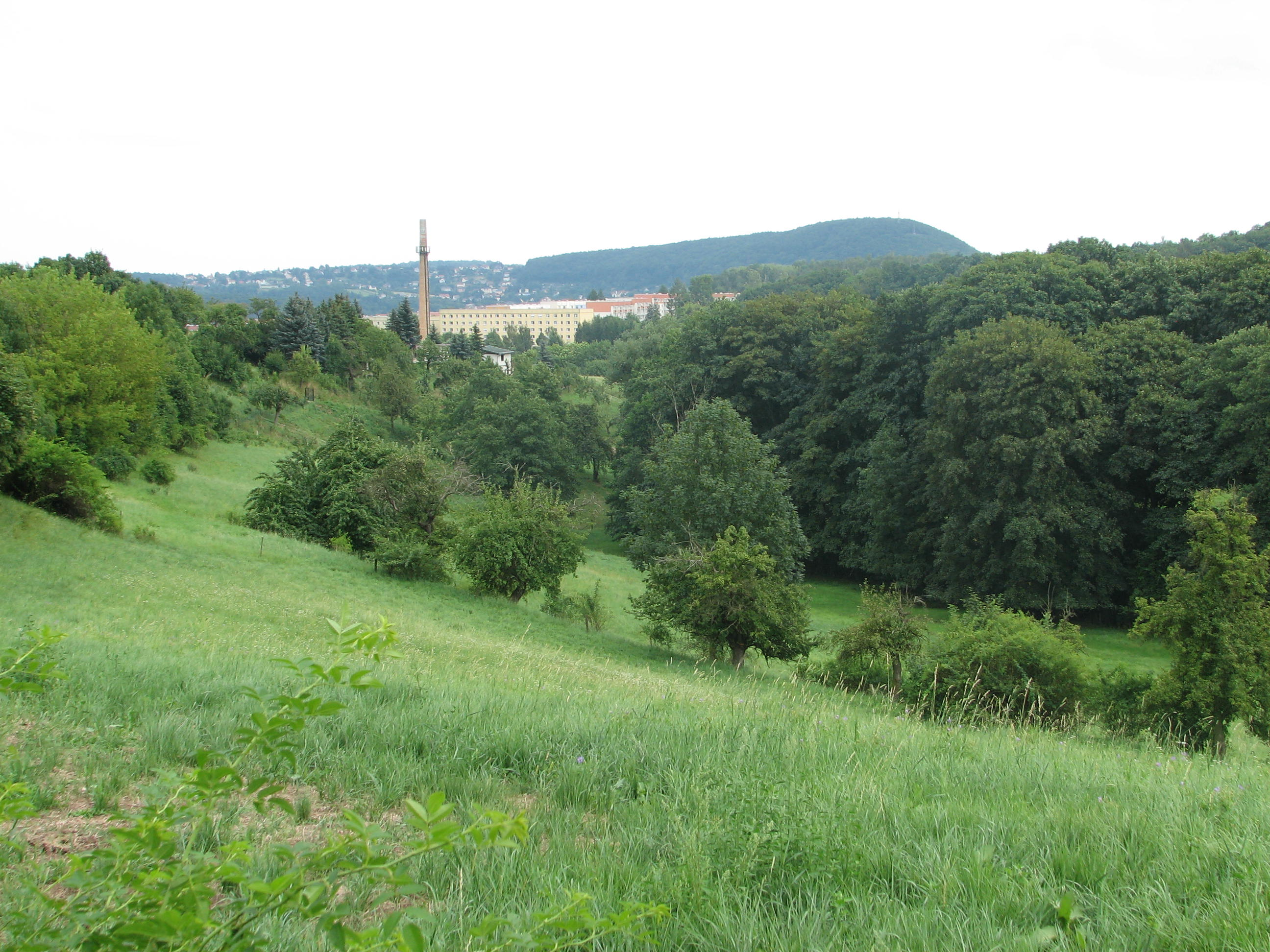 Tal des Quänebaches von Wurgwitz (oberhalb der Schule) Richtung Zauckerode und Windberg.